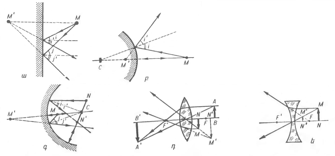 Օպտիկական պատկերների առաջացումը